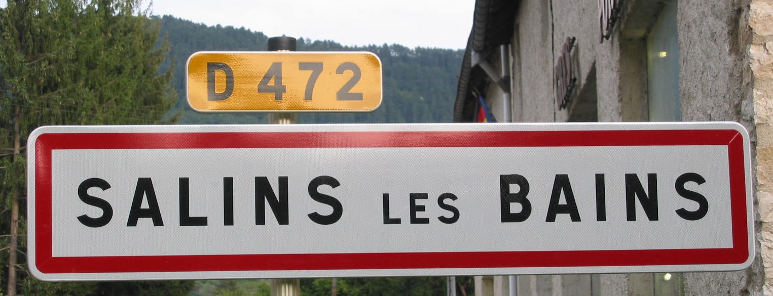 Salins-les-Bains (39)